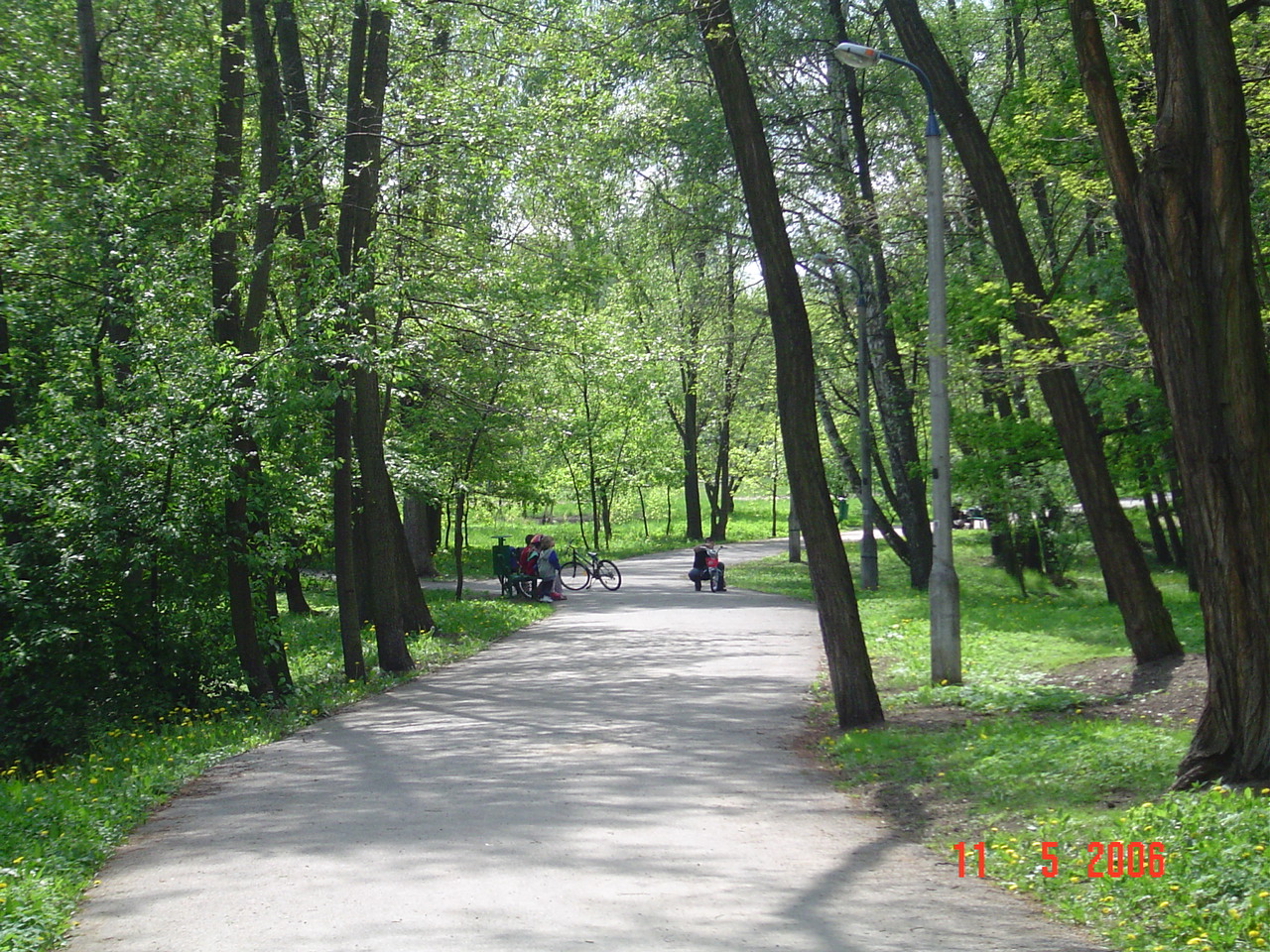 Kraków - Borek Falecki, park Solvay